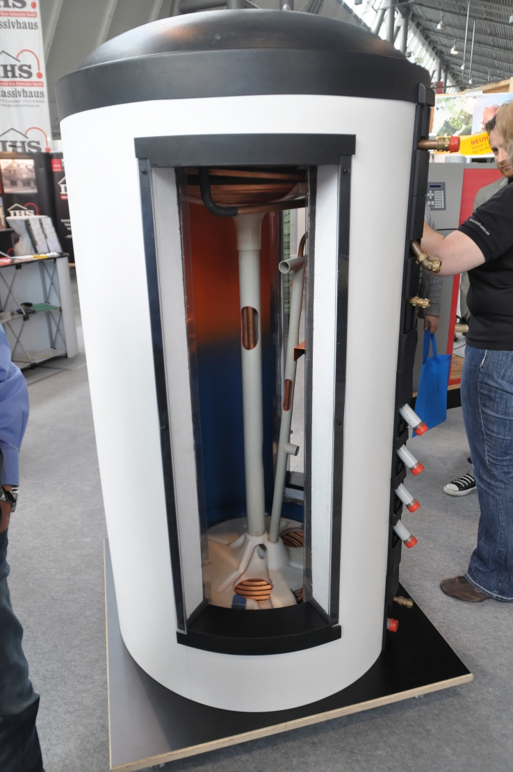 Messe HAUS HOLZ ENERGIE 2012 in Stuttgart Dieses Foto entstand durch Unterstützung des gemeinnützigen Vereins Skillshare.eu Skillshare e.V. ist ein eingetragener gemeinnütziger Verein zur Förderung der Bildung durch Unterstützung der Erstellung, Sammlung und Verbreitung so genannten freien Wissens. IBAN: DE16 8306 5408 0004 8850 66 BIC: GENODEF1SLR Bank: VR-Bank Altenburger Land